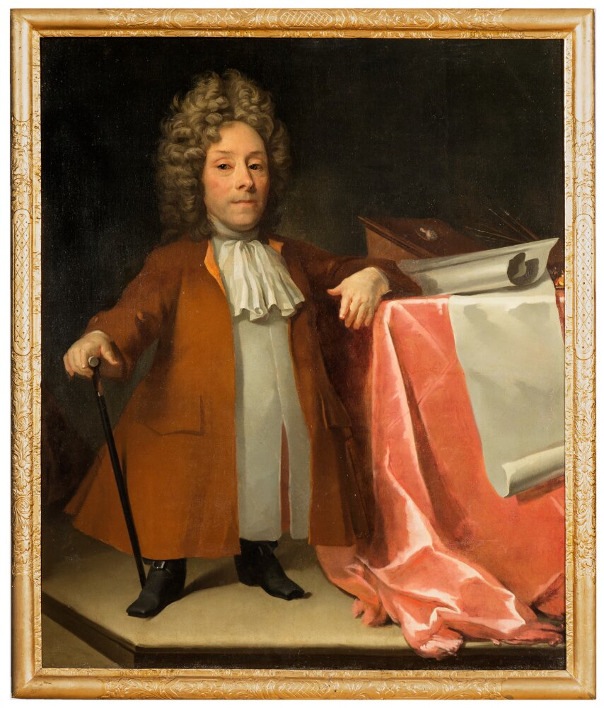 Den svenske miniatyrmaleren Andreas von Behn (1650–1730). Maleriet er tilskrevet David von Krafft (1655–1724)